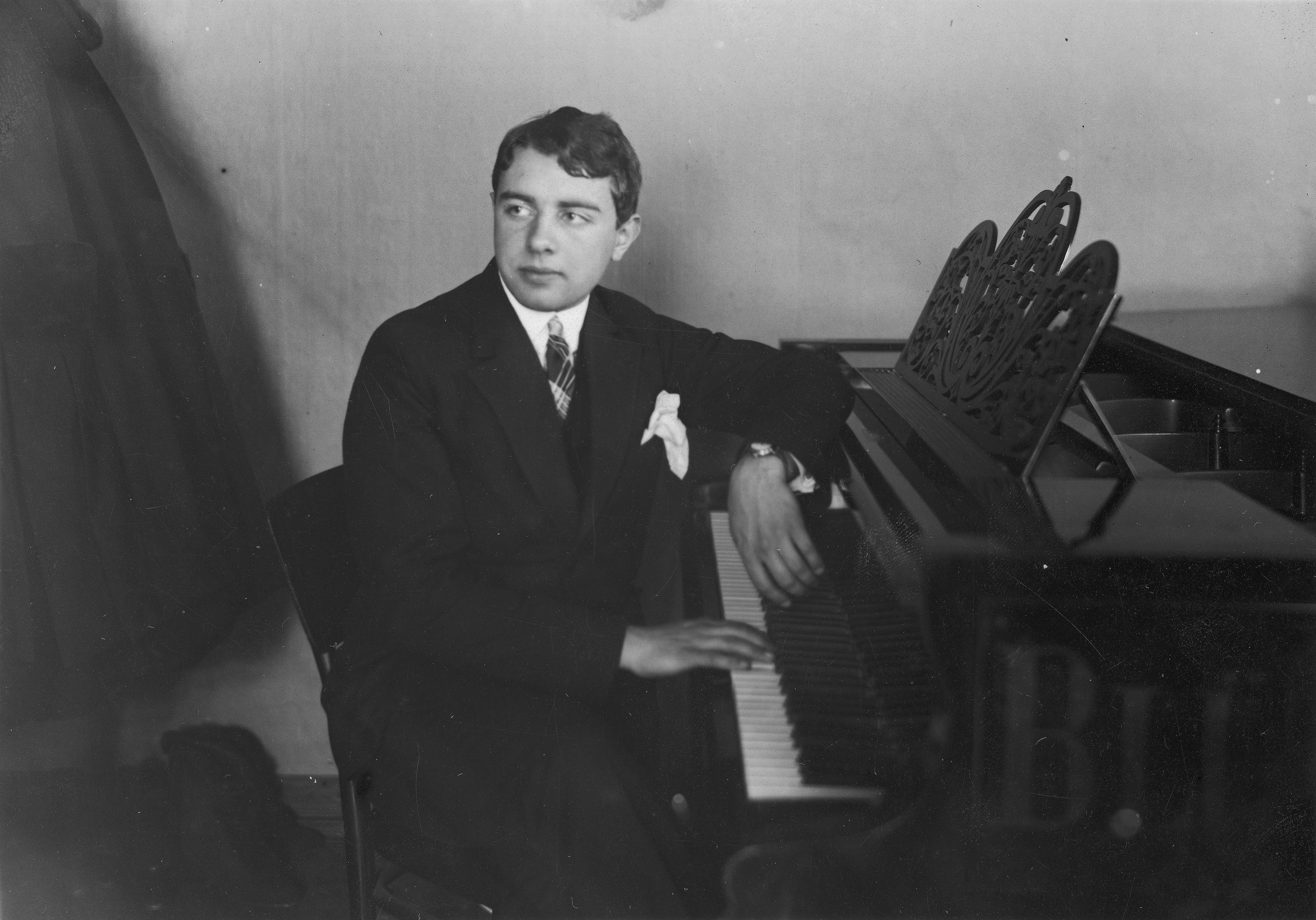 1st Chopin Competition laureate: Lev Oborin